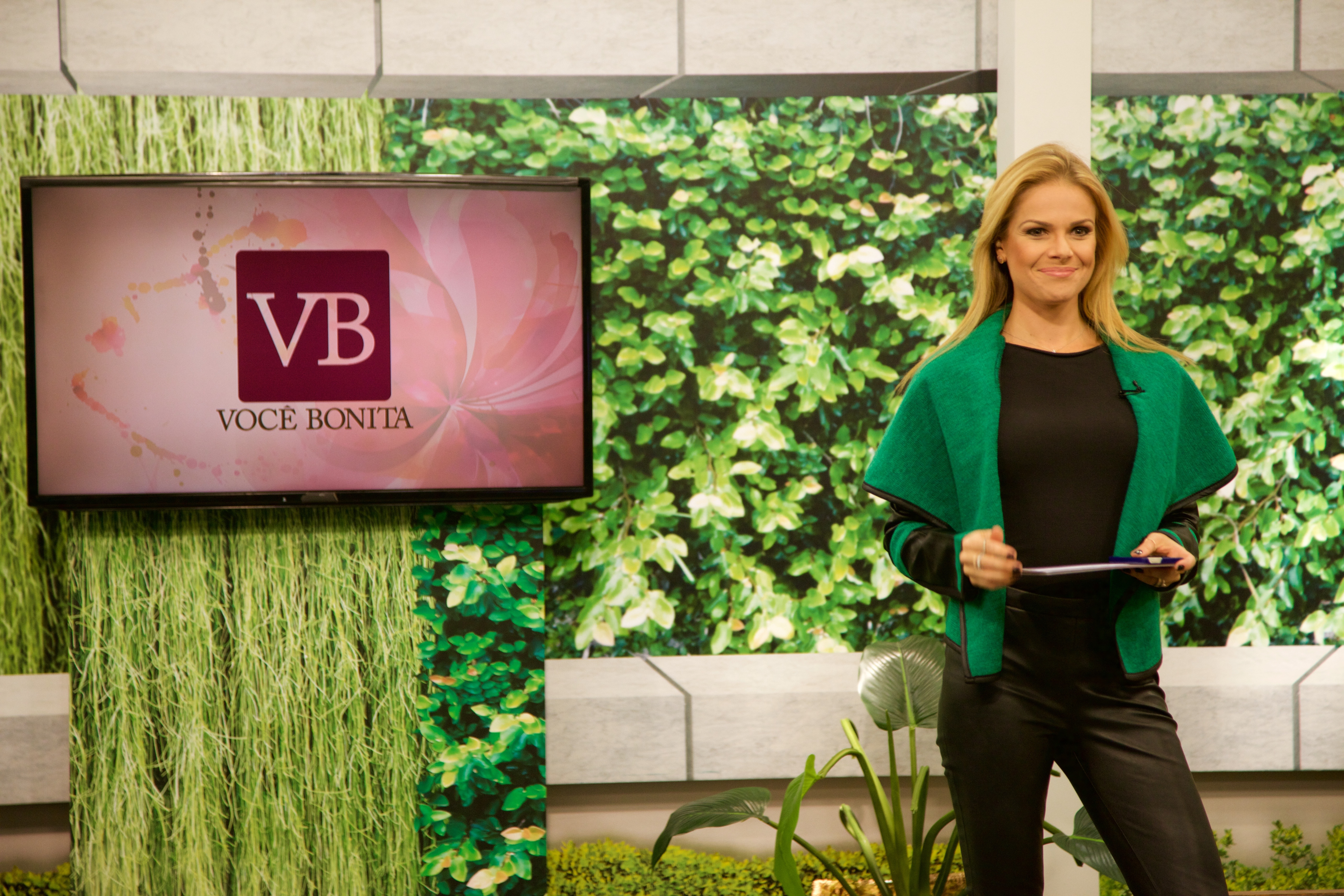 Programa Você Bonita, exibido diariamente pela TV Gazeta.